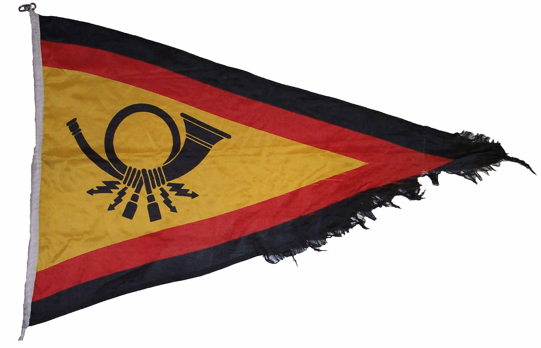 Deutsche Postschifffahne Die Fahne wurde auf einem normalen Fährschiff immer dann gehisst, wenn ein Postauto oder ähnliches mit an Bord war. War dies der Fall gewesen, war das Schiff im hoheitlichen Auftrag unterwegs gewesen. Aufnahmeort: Postmuseum Rheinhessen in Erbes-Büdesheim bei Alzey, Deutschland